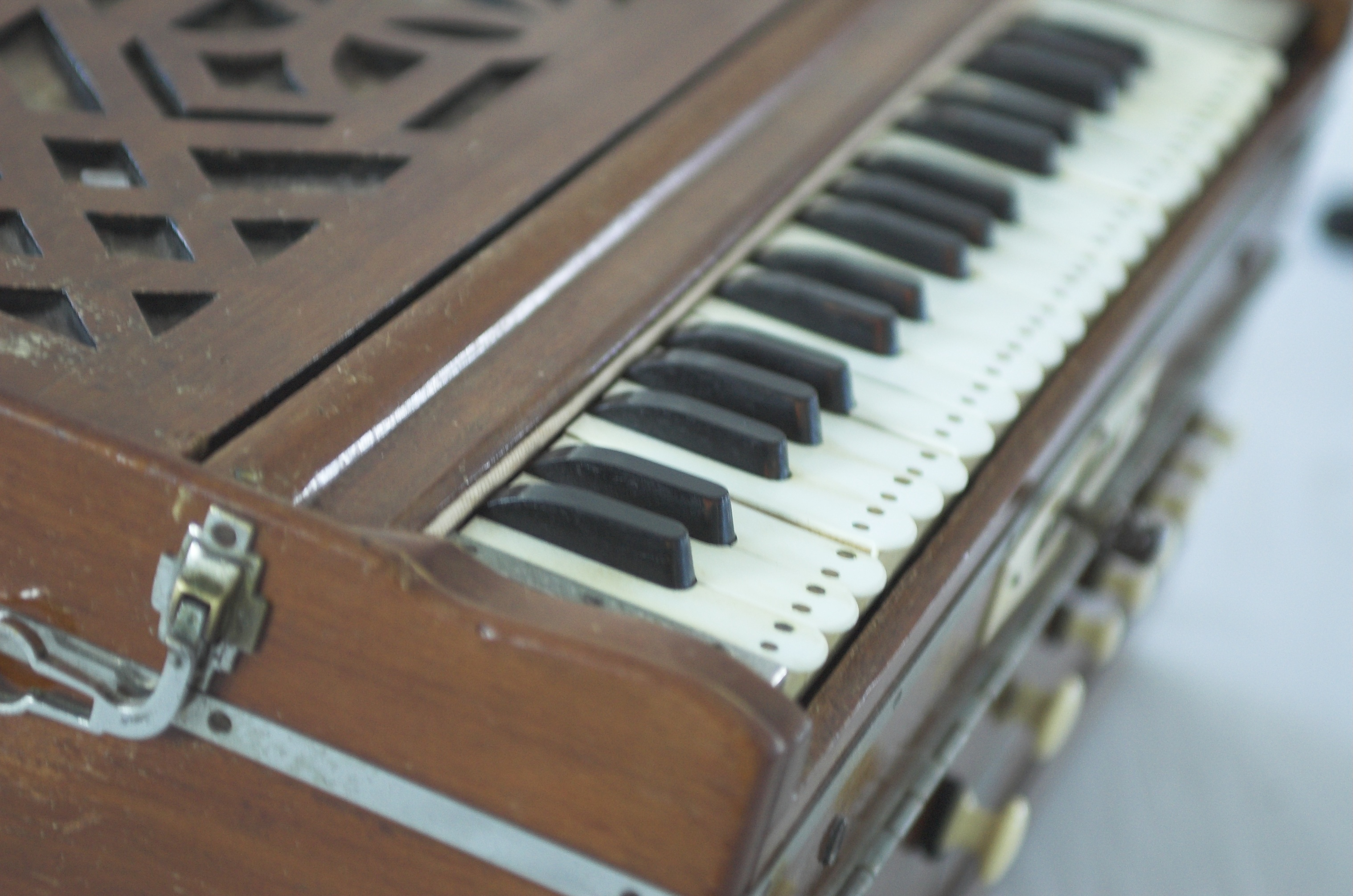 Harmonium